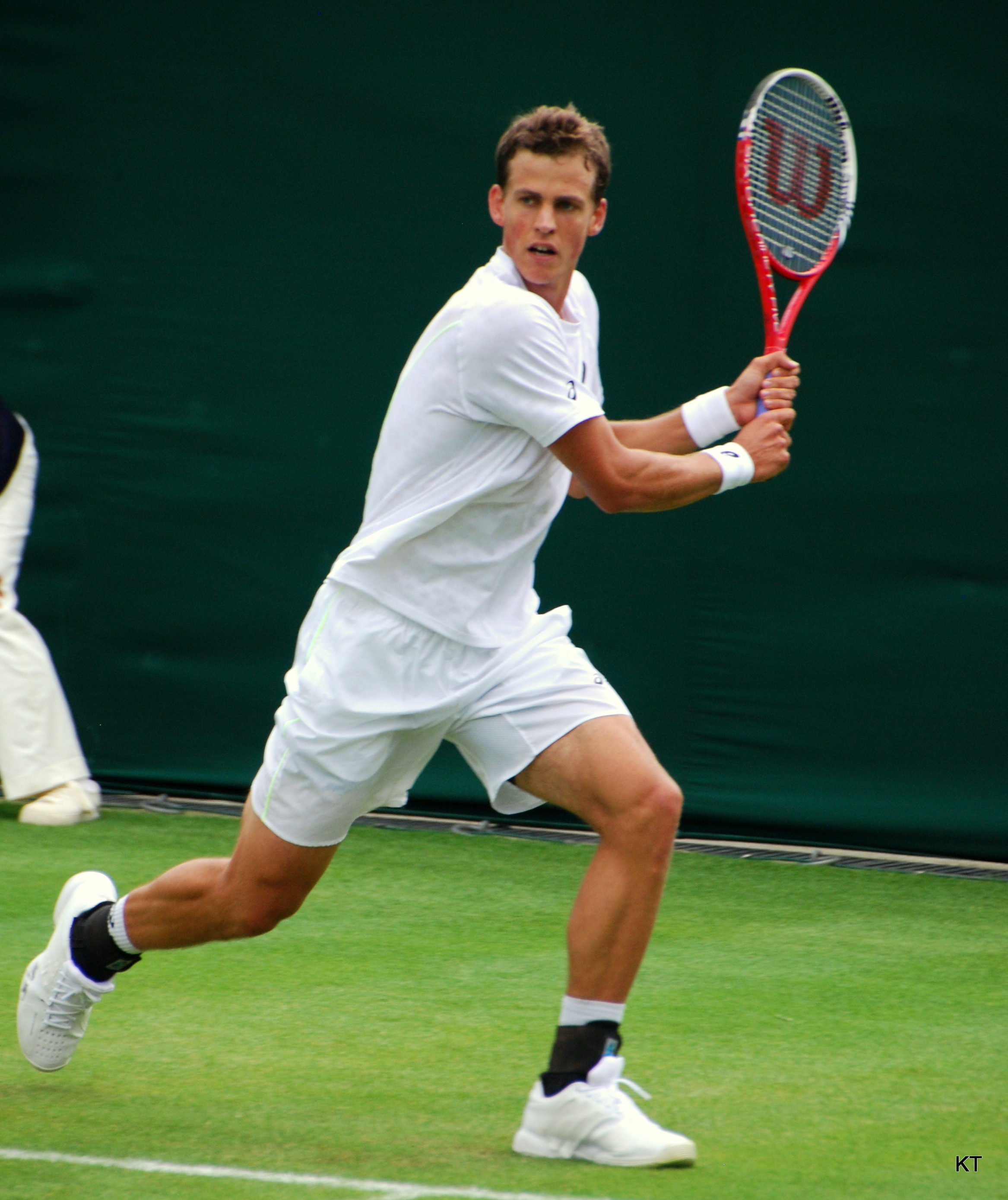 Vasek Pospisil